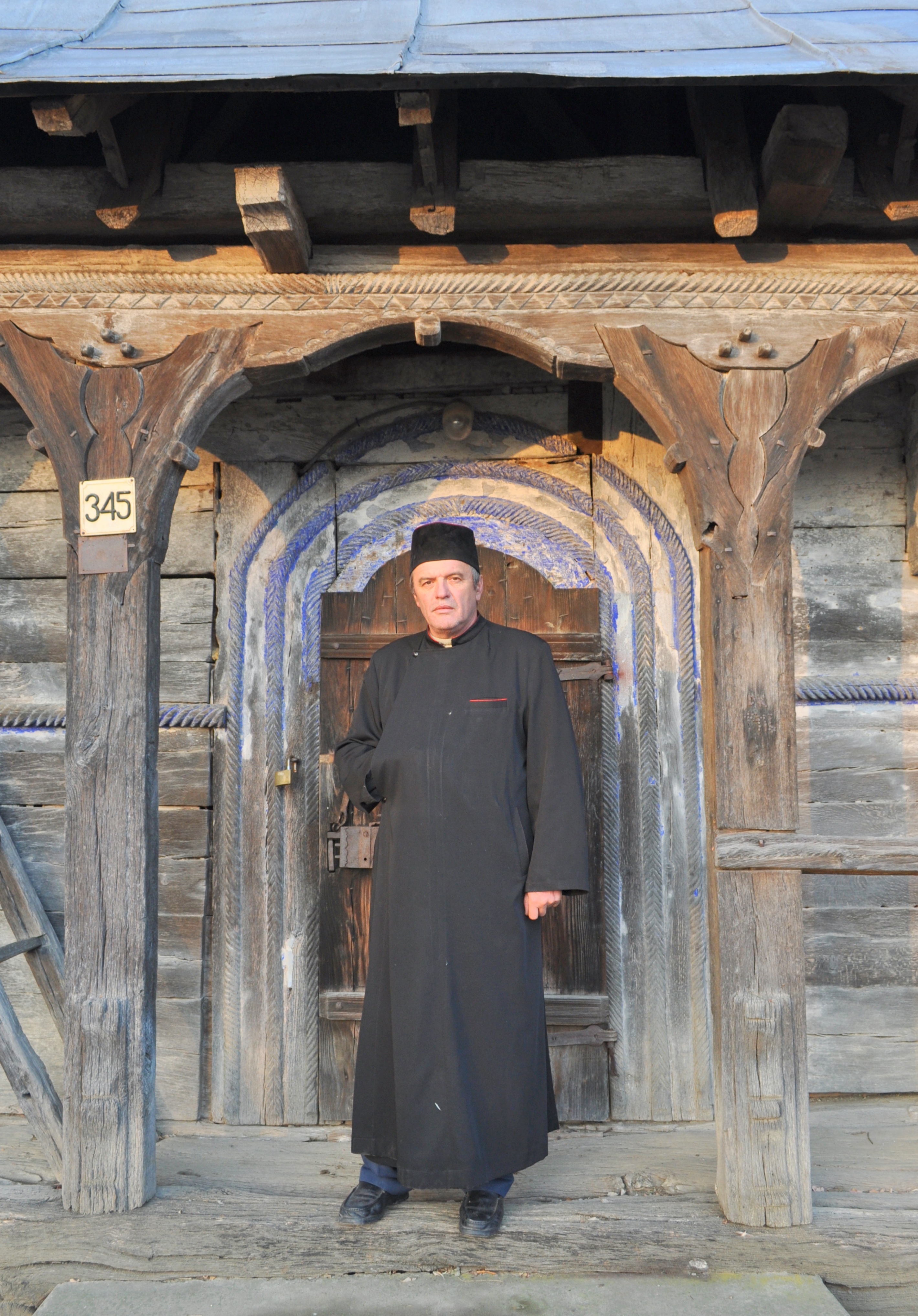 Biserica de lemn "Sfinții Arhangheli Mihail şi Gavriil" din Chieșd, județul Sălaj